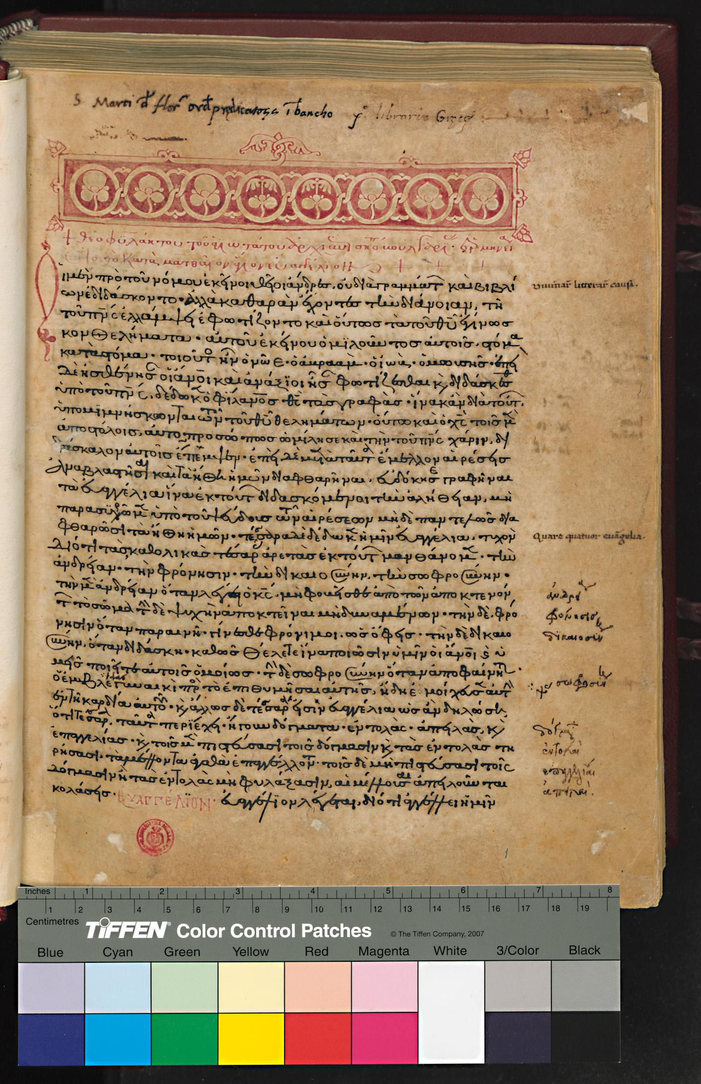 folio 1 recto